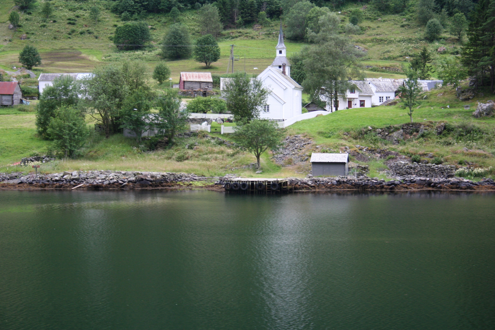 Nærøy